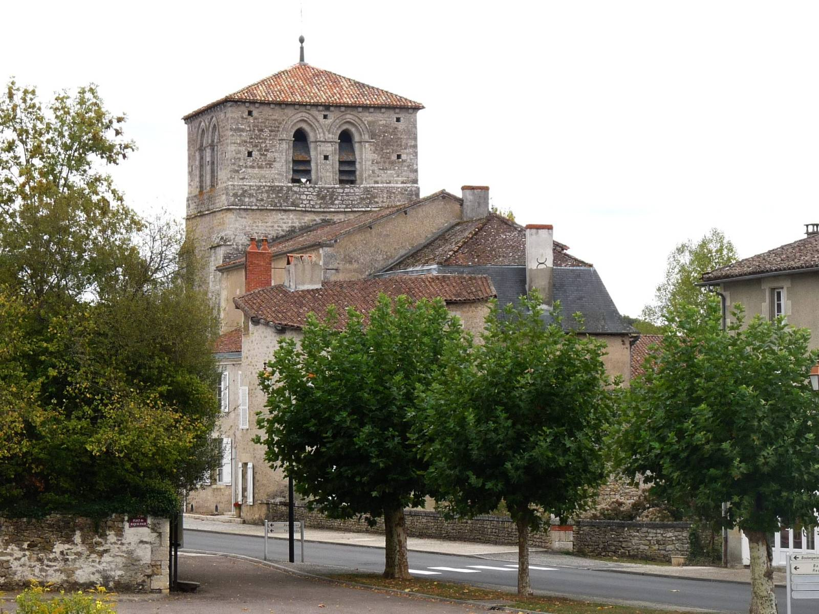 église d'Alloue, Charente, France